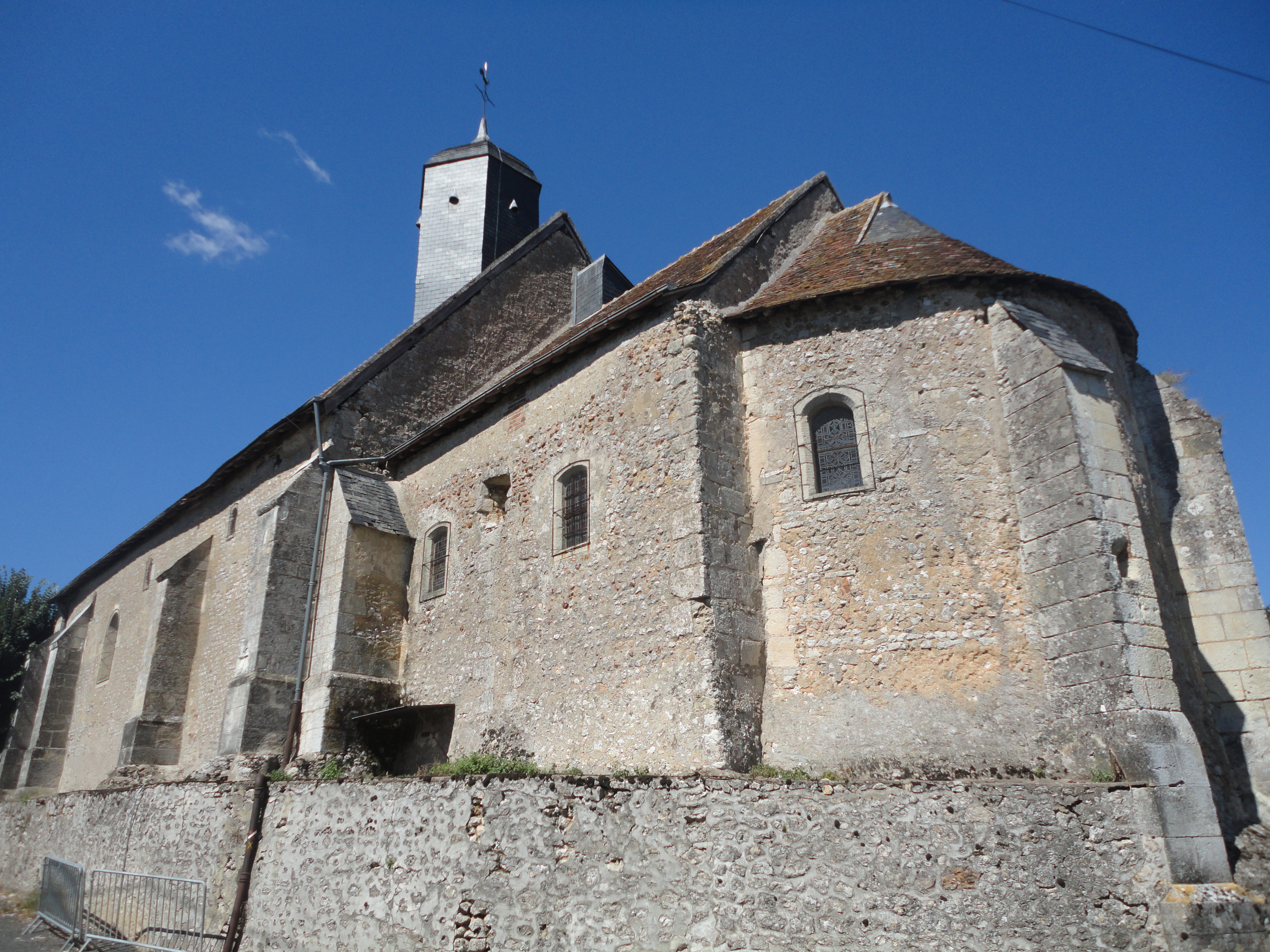 Le choeur du XIIe siècle de l'église de Neuillé le Lierre